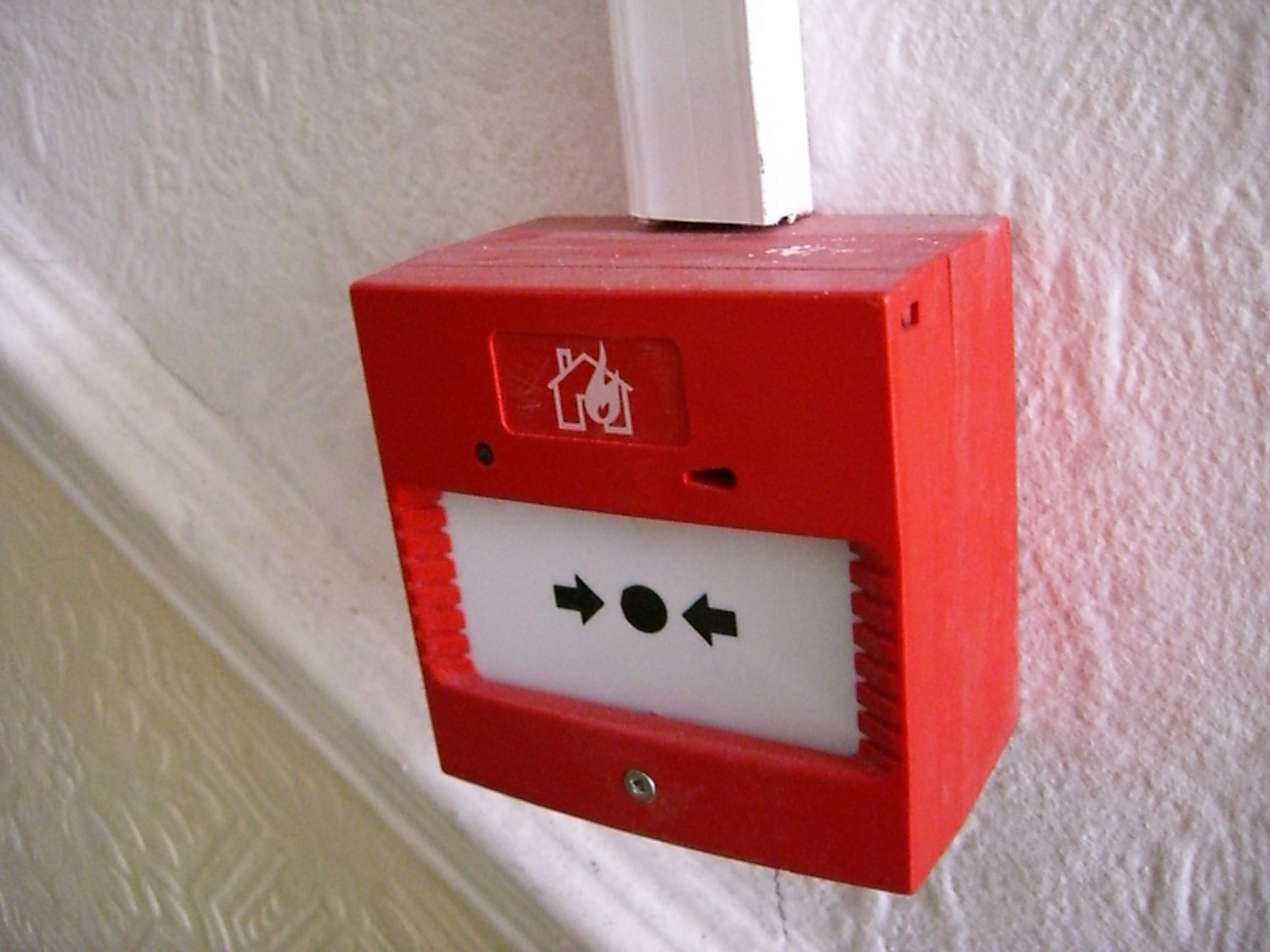 Manual call point